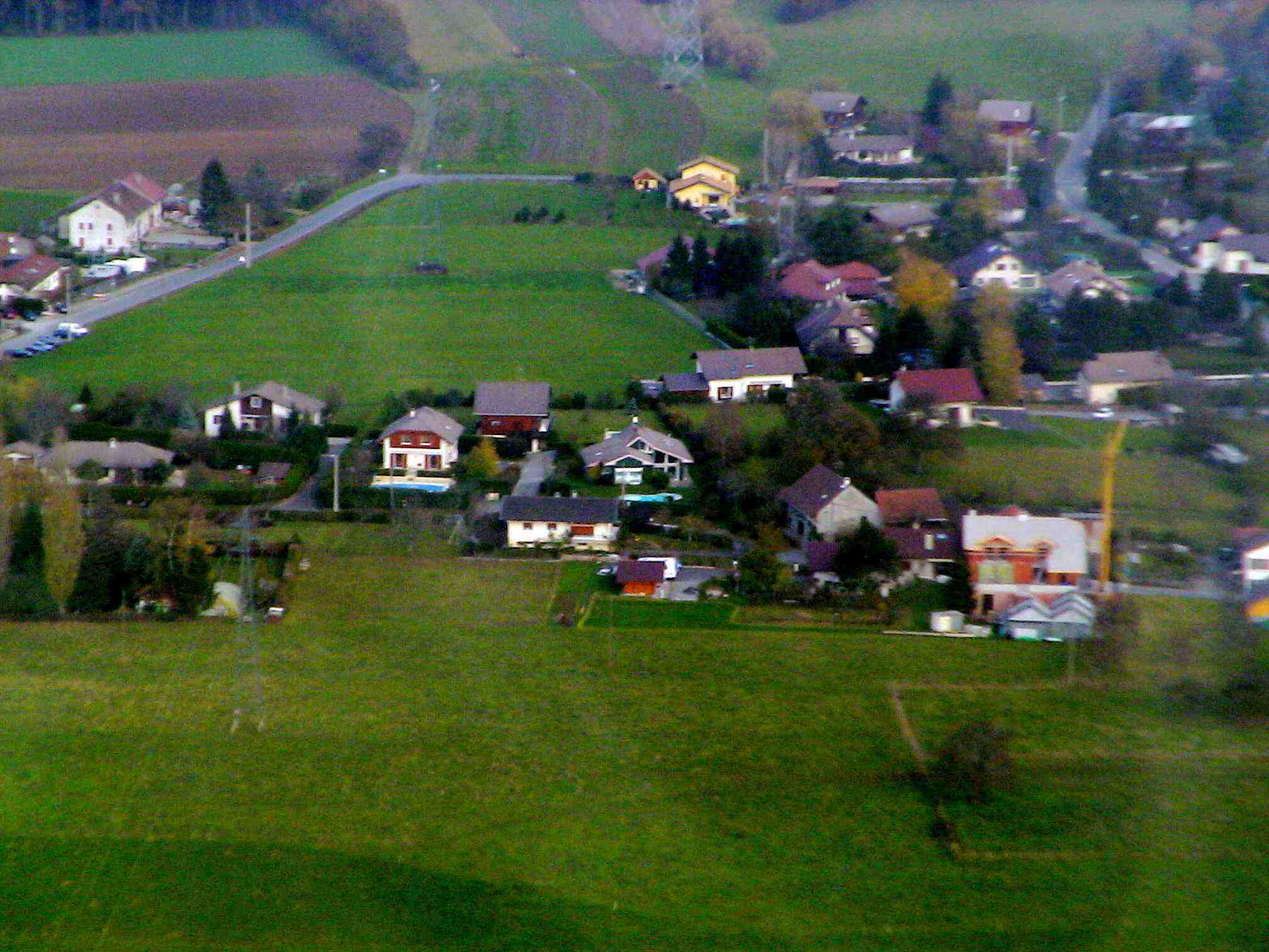 photo JP BENOIST vue prise été 2004 à bord du Kitfox FJEQT. JP Benoist, été 2004